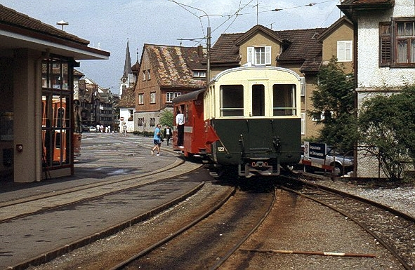 Altstätten SG, Blick zur Stadt, im Vordergrund der heute als historischer "C 13" bzw. B 223 restaurierte Wagen der vormaligen Altstätten-Gais-Bahn